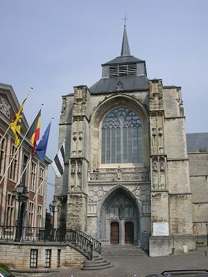 Sint-Sulpitiuskerk (Diest)